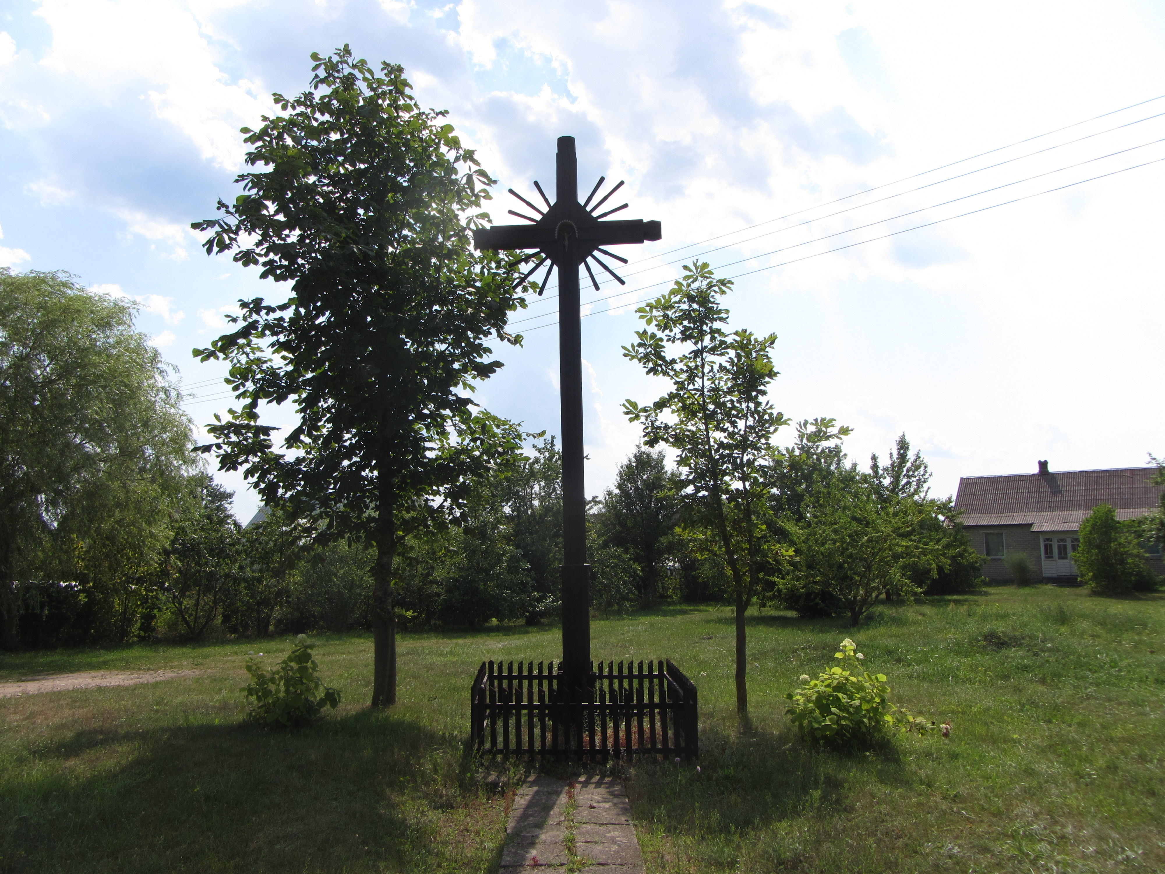 Žaugėdai, Lithuania